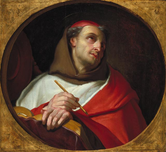 Saint Bonaventure